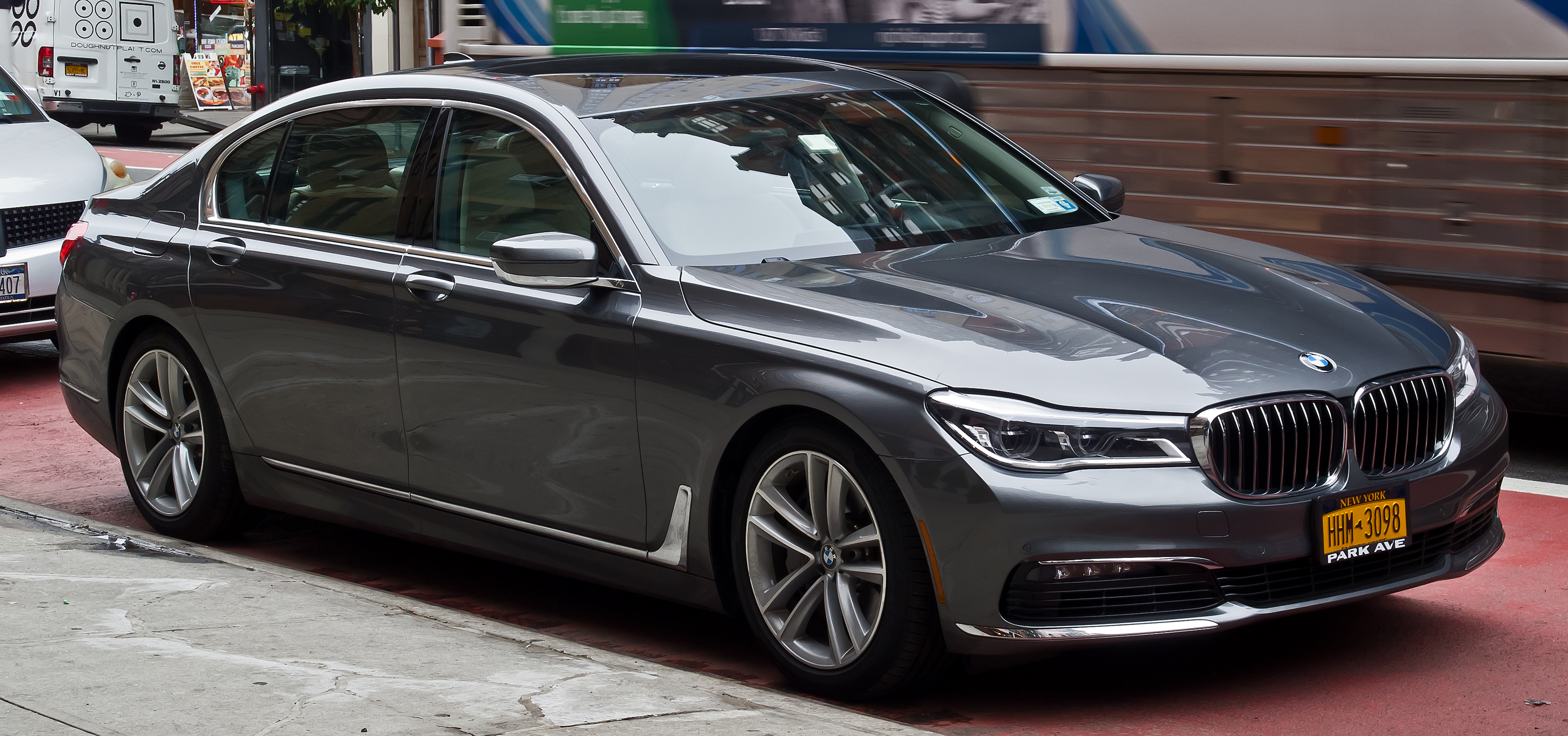 BMW 750i (G12)